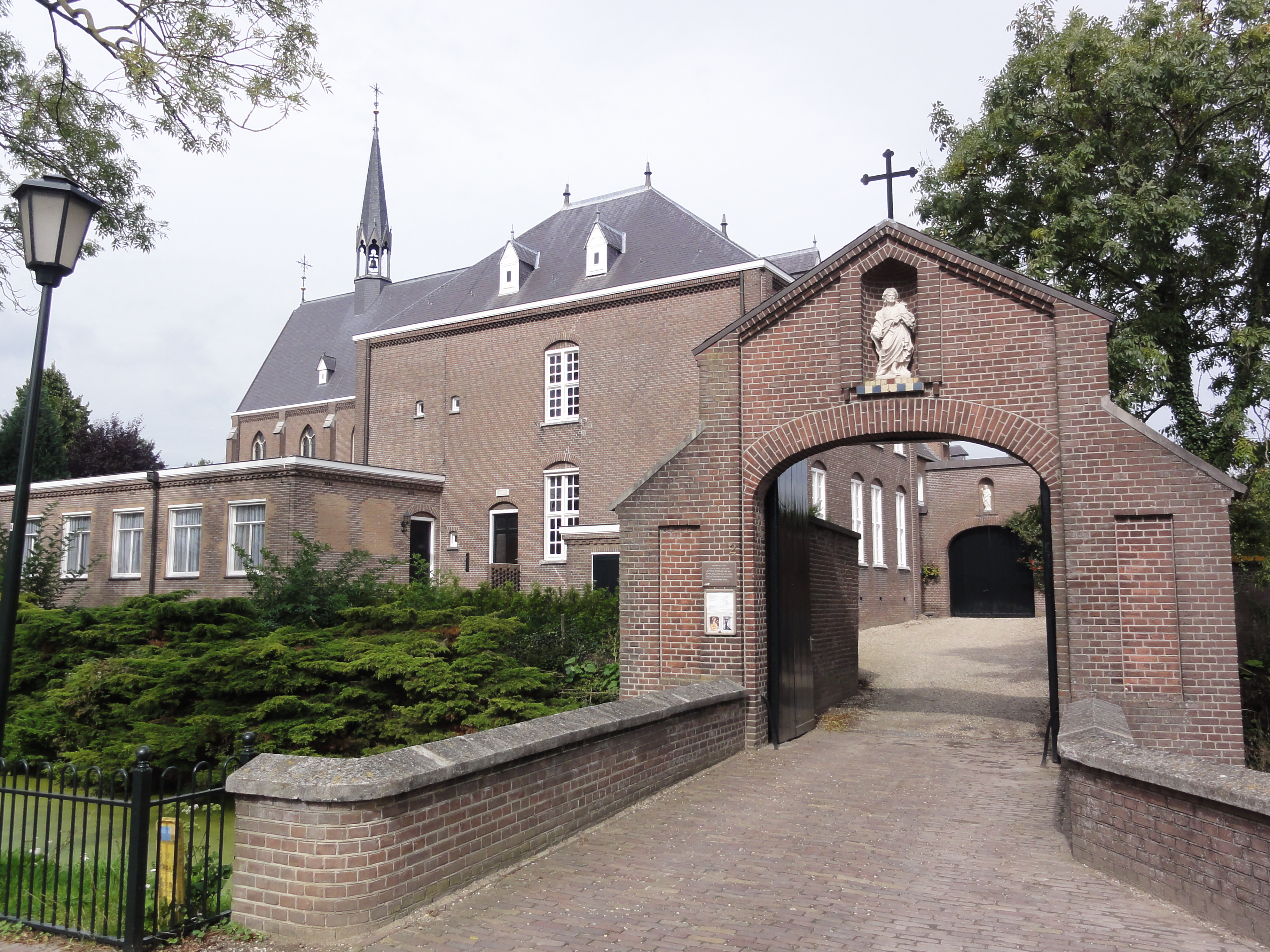 Megen Rijksmonument 28513 Clarissenklooster, Clarastraat 2 83″ N, 5° 33′ 43.74″ E Object location51° 49′ 22.42″ N, 5° 33′ 42.05″ E